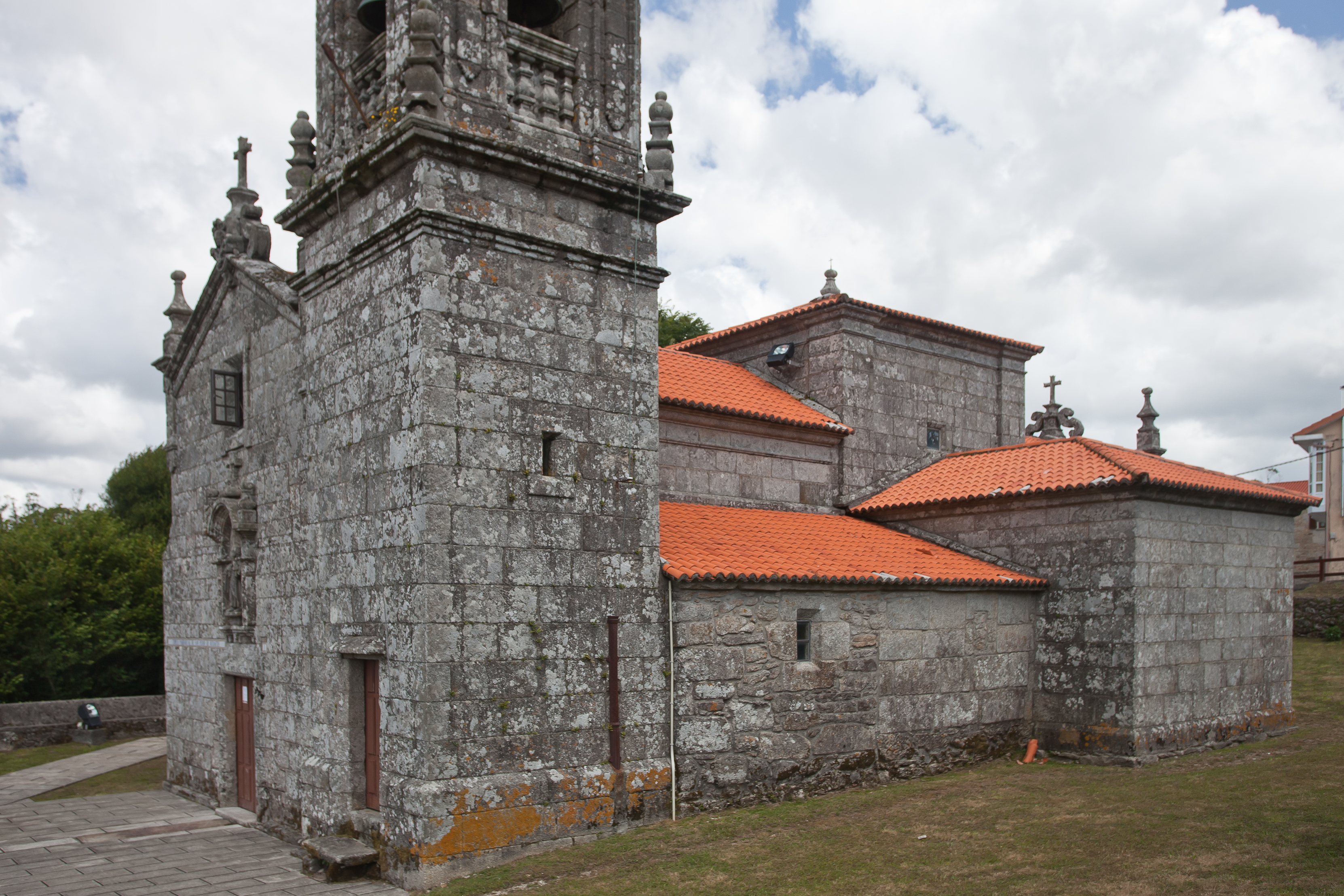 Igrexa de San Pedro de Buxantes, Dumbría, Galiza